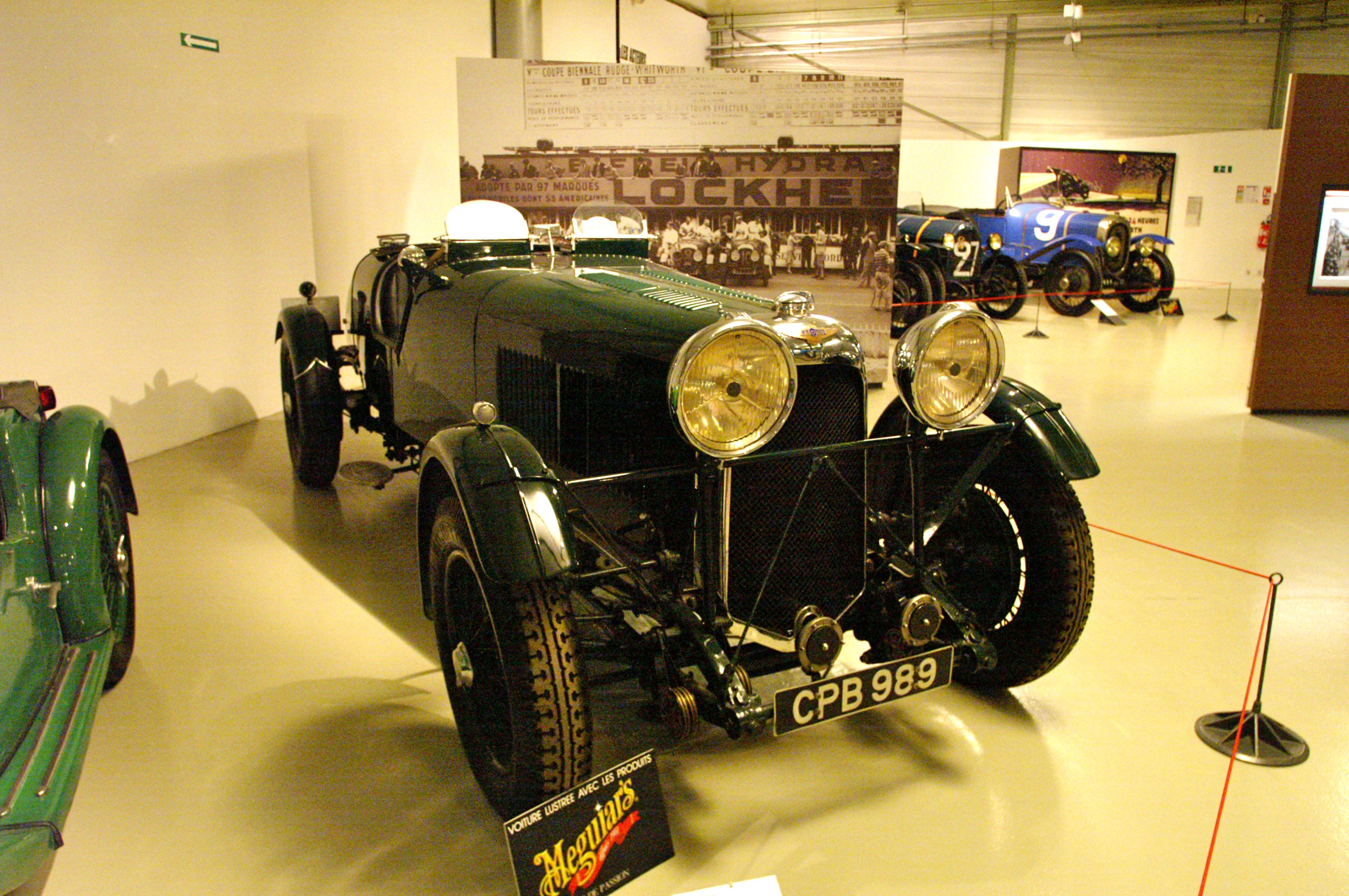 Le Musee des 24 Heures. Winner Le Mans 1935